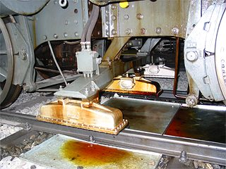 Magnety švýcarského zabezpečovače Signum na muzejním krokodýlu - Verkehrshaus Luzern